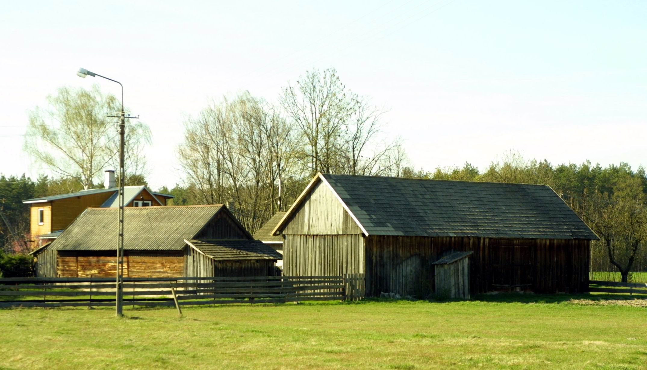 Zagroda we wsi Laskowizna (w województwie mazowieckim, w powiecie ostrowskim, w gminie Brok)